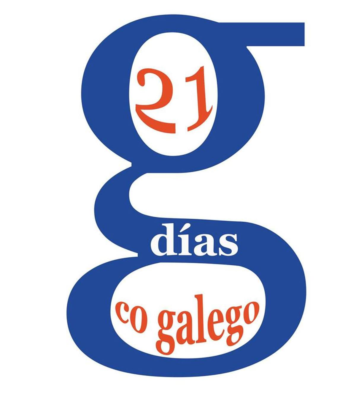 Logo de 21 días co galego.